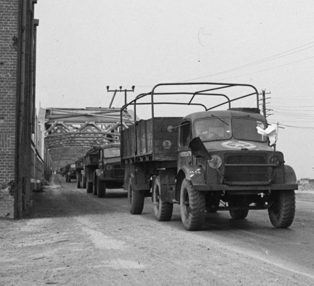 Voedseltransport op weg van Rhenen naar West-Nederland. De legertruck voert de witte vlag omdat de capitulatie nog niet is getekend.